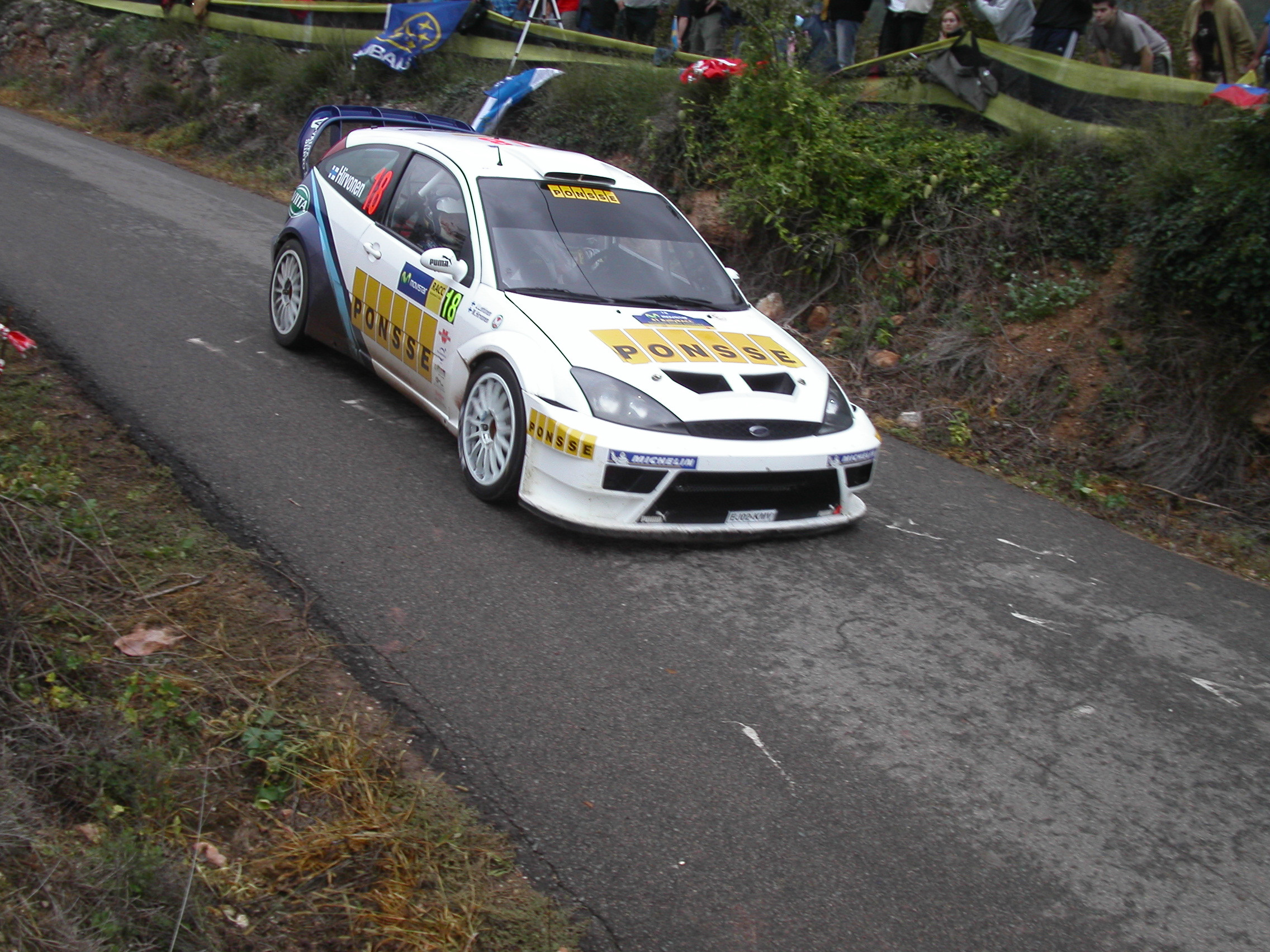 Hirvonen, Rallye Catalunya 2005.